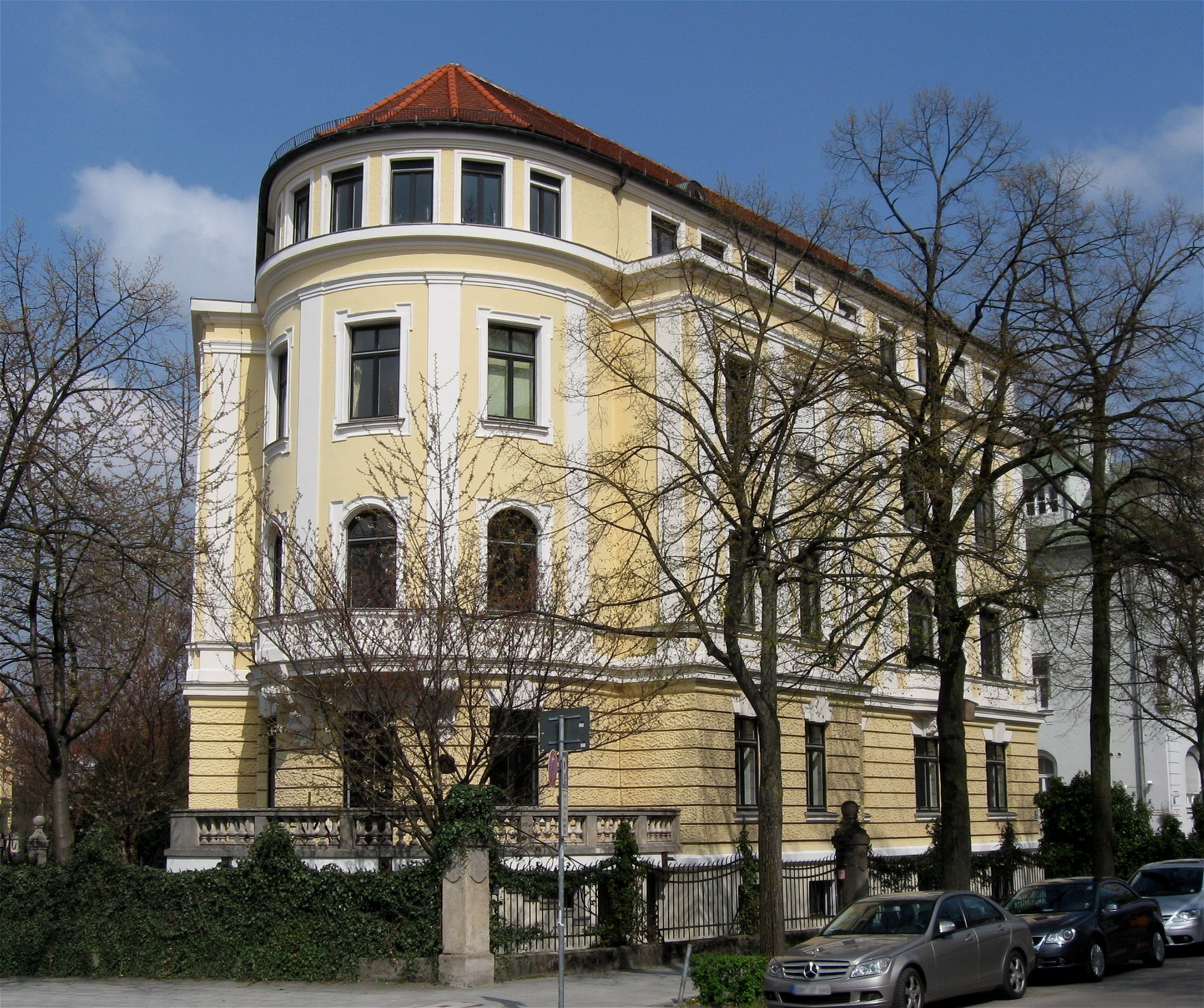 Mozartstraße 18; Mietshaus, neubarock, 1896 von Albert Theodor Lenz; an der Ostseite Stuckreliefbildnis Mozarts in Rocaillekartusche; mit Nr. 23 die Einmündung in den halbrunden Esperanto-Platz flankierend.